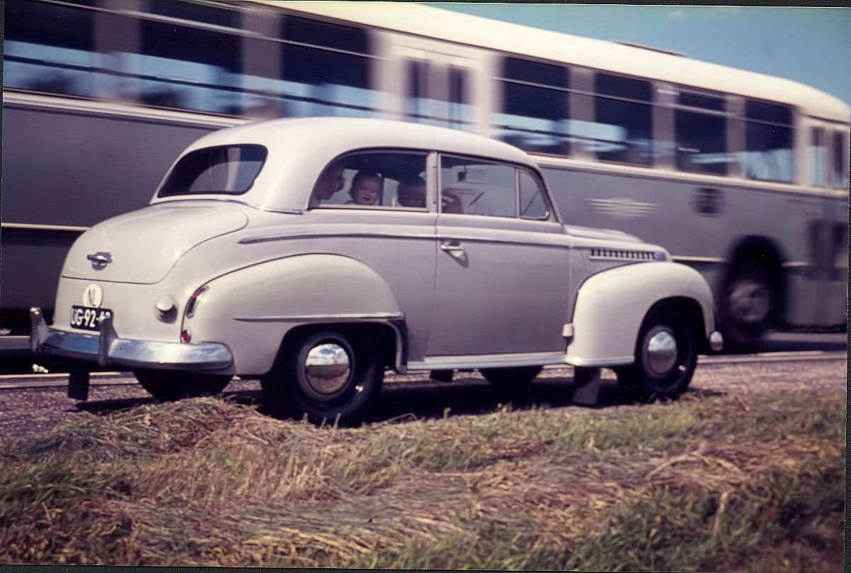 Een Opel Olympia van 1952, gefotografeerd in 1963. Op de achtergrond een lijnbus van de NZH